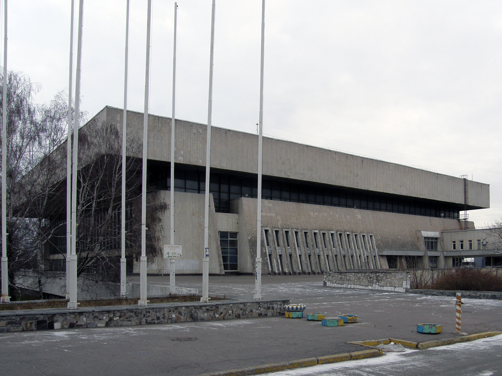 дворец спорта «Метеор»